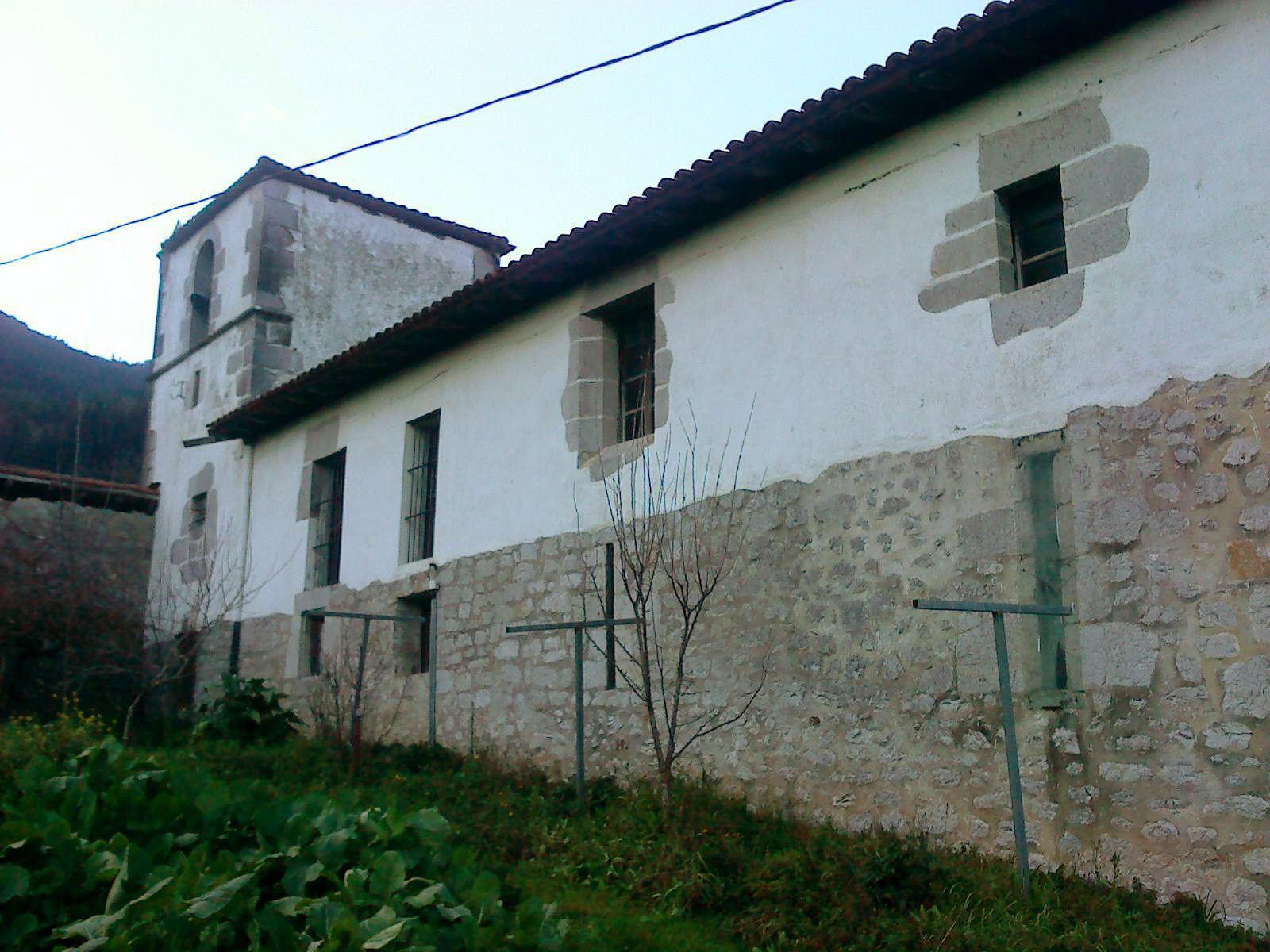 Iglesia de San Andrés de Astigarribia de Motrico Guipuzcoa, País Vasco (España)